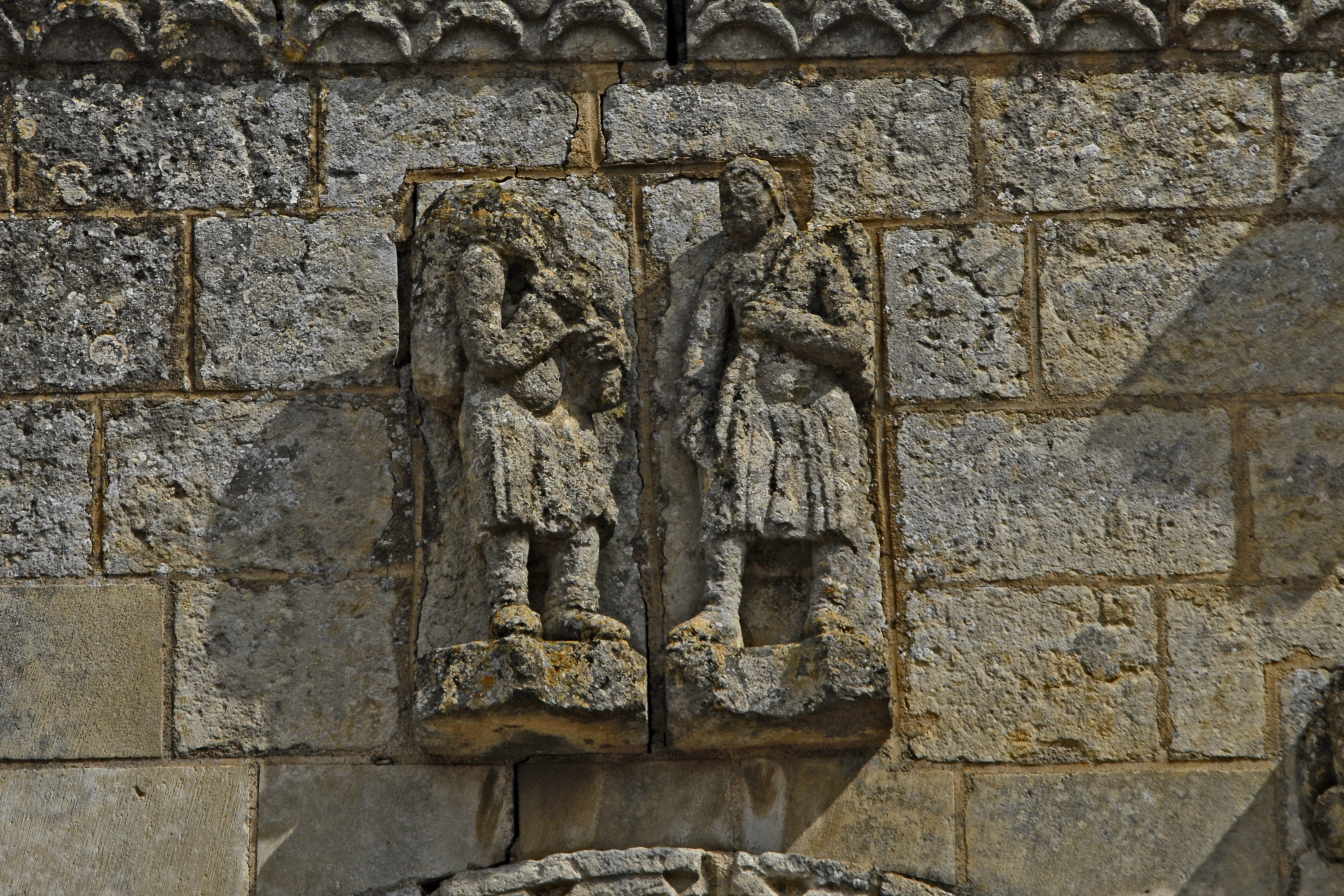 Saint-Jouin-de-Marnes, Reliefs über linkem Fenster